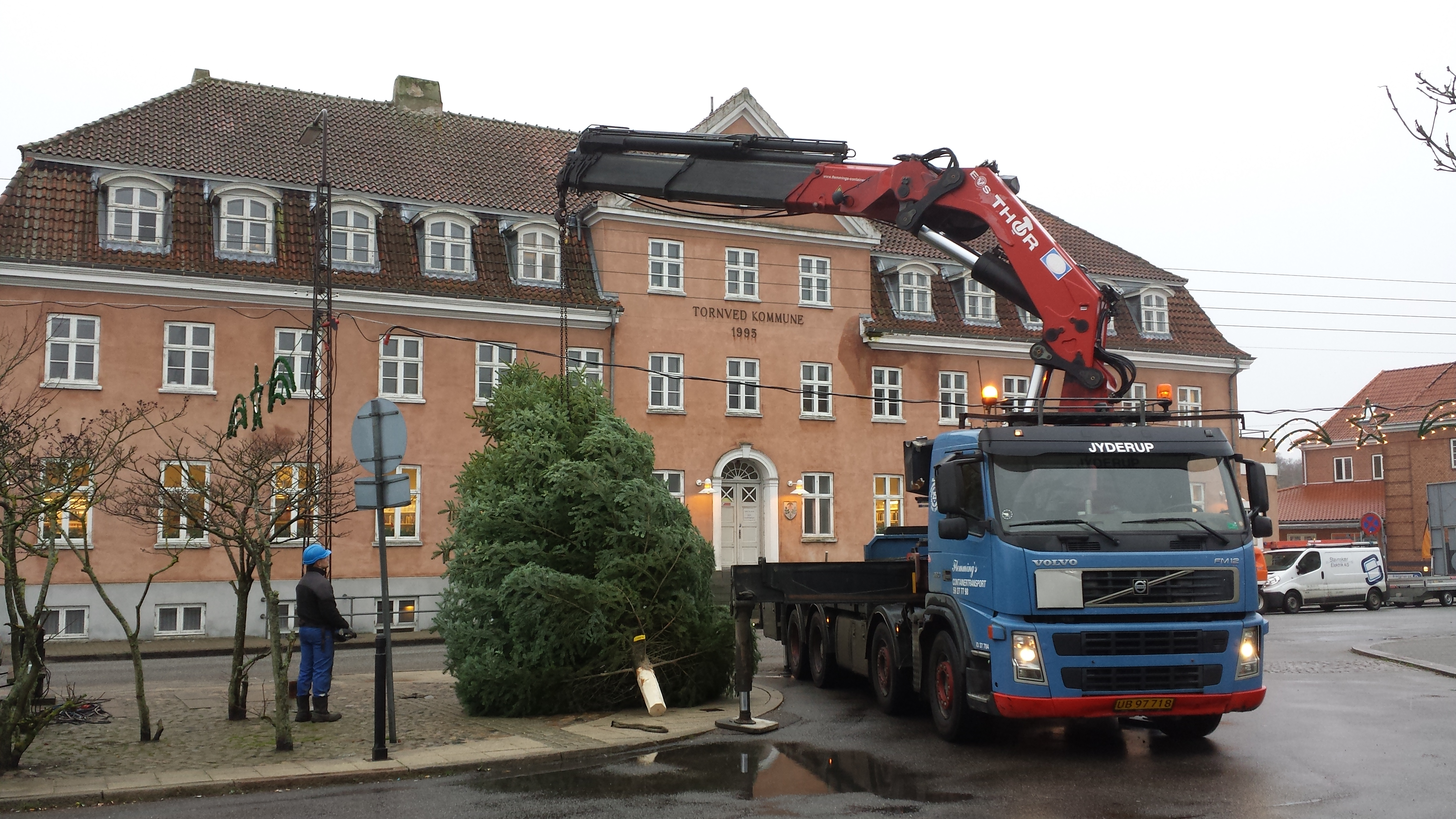 På billedet er byens juletræ ved at blive rejst.